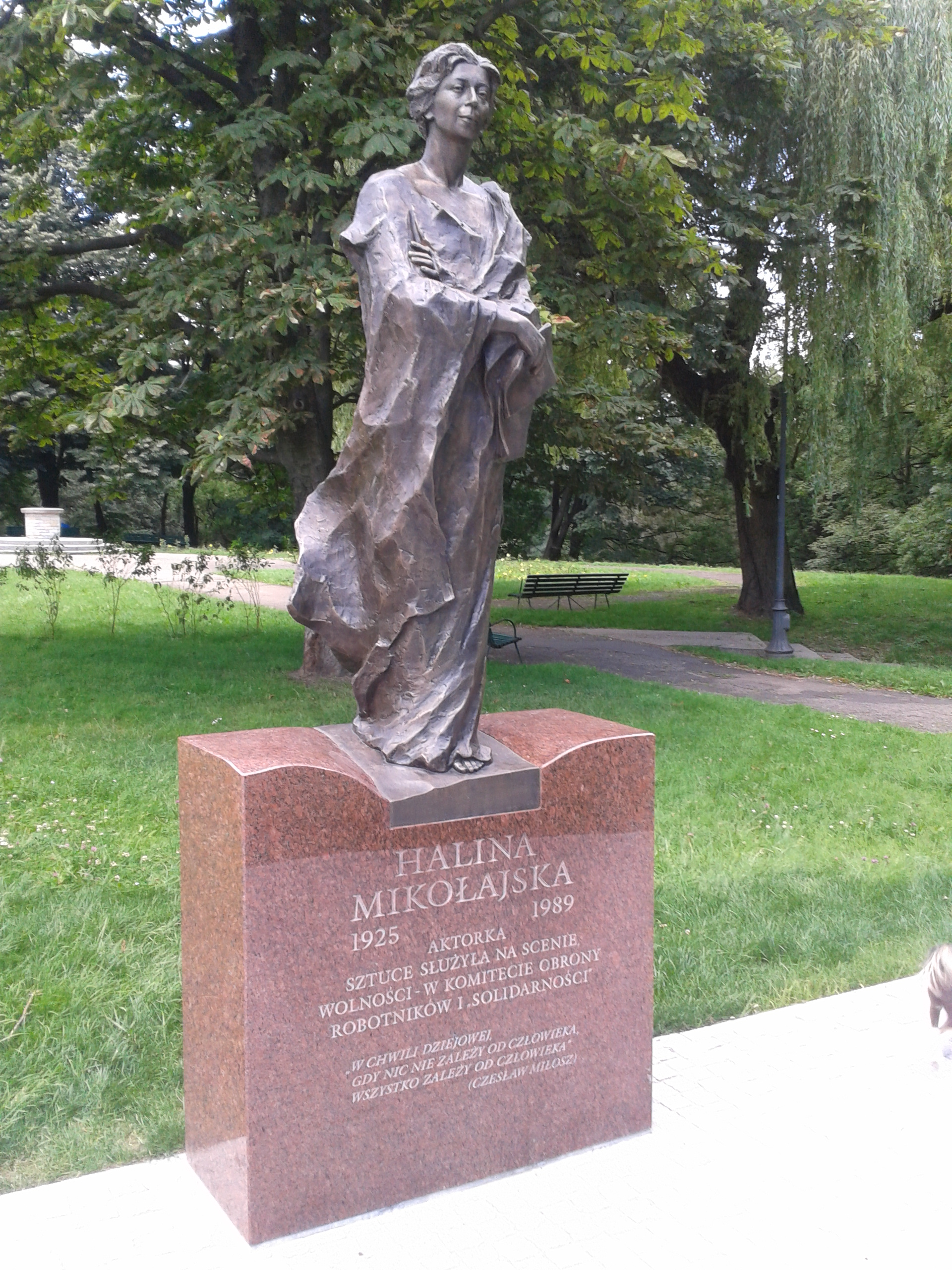 Pomnik Haliny Mikołajskiej. 4 czerwca 2012 w parku im. Rydza-Śmigłego w Warszawie koło budynku Senatu został odsłonięty pomnik aktorki stworzony przez Krystynę Fałygę-Solską. Odsłonięcia pomnika dokonali prezydent Bronisław Komorowski i Danuta Szaflarska.